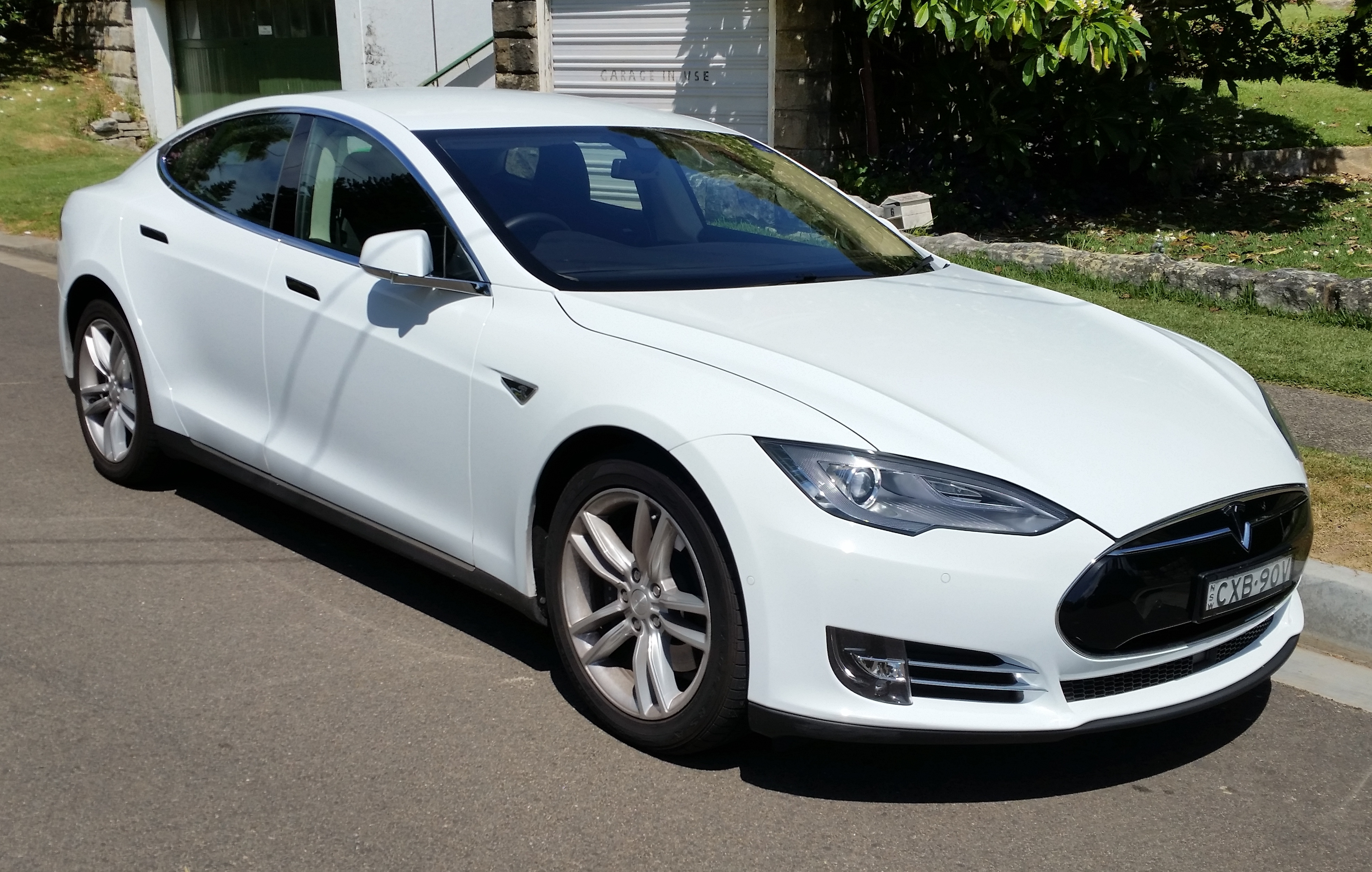 Tesla Model S 60